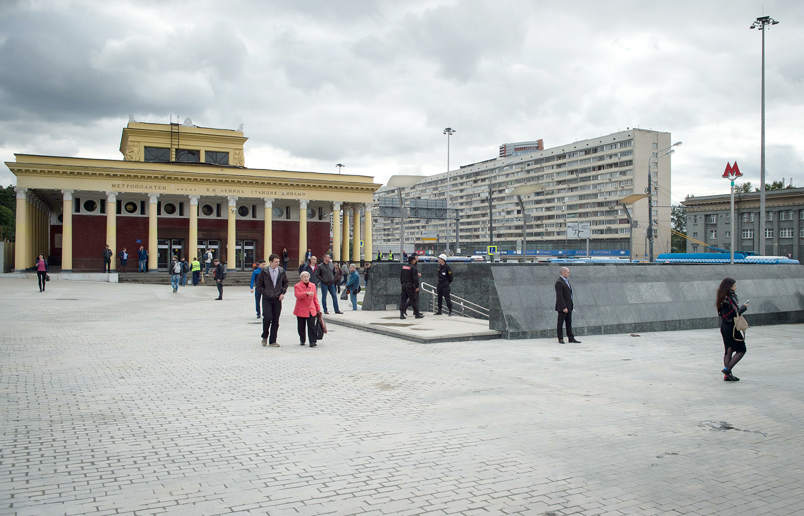 Вестибюли станций метро Динамо и Петровский парк